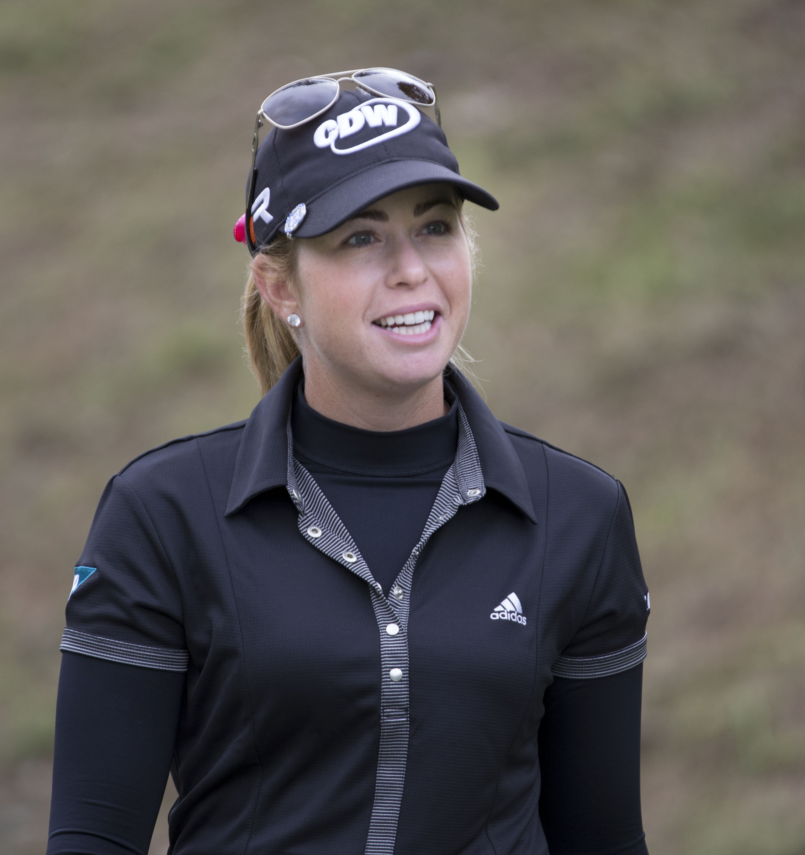 LPGA Kingsmill Williamsburg, VA 2013